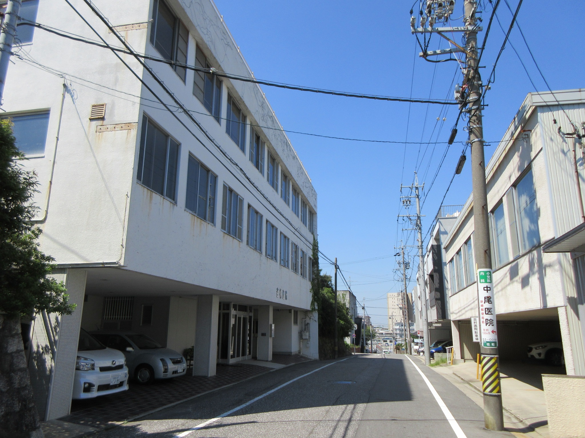 吉村医院（岡崎市柱町）